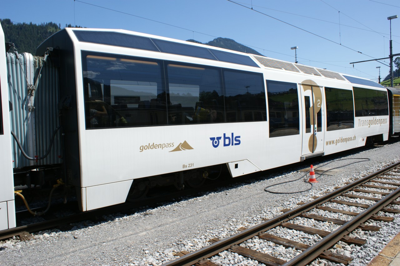 Der Niederflur-Panormawagen Bs 231 der Montreux–Berner Oberland-Bahn ein Jahr nach seiner Indienststellung in Zweisimmen. Die Aufschriften wurden seither geändert, das Fragezeichen und das bls-Logo verschwanden, dafür ist der Unternehmensname unter dem GoldenPass-Logo dazugekommen.